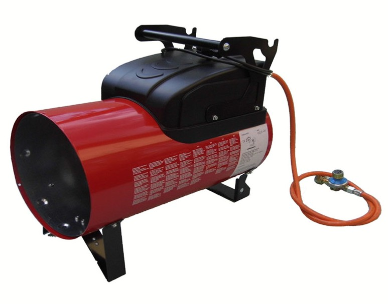 Kispamacs G30P 31 kW-os mobil pb gázos ipari hőlégfúvó, szabályozható teljesítményű készülék. A hőlégfúvónak tartozéka a tömlő és a nyomáscsökkentő is.